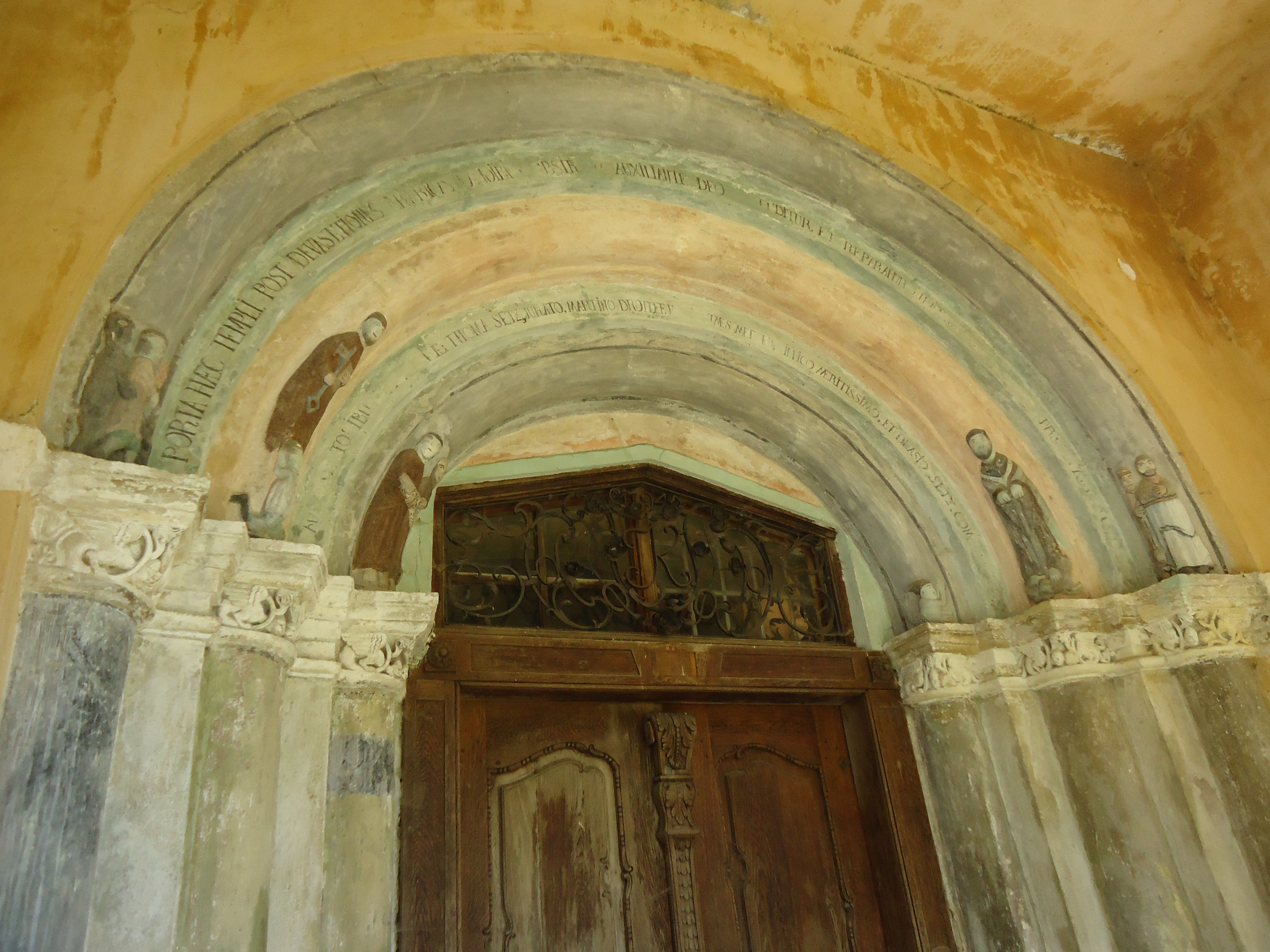 Portalul de sud al biserii din Hosman, unul dintre cele mai vechi din Transilvania